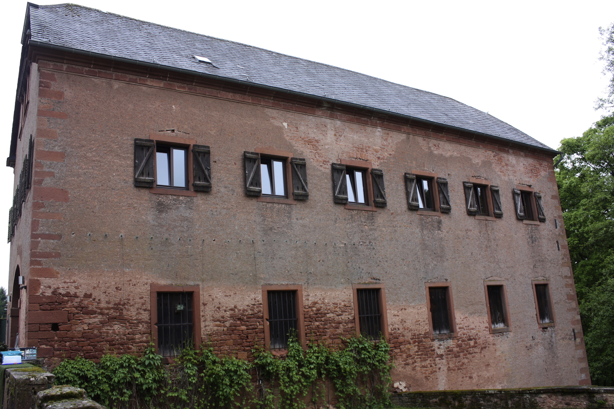 Historische Zehntscheune von Schloss Föhren.